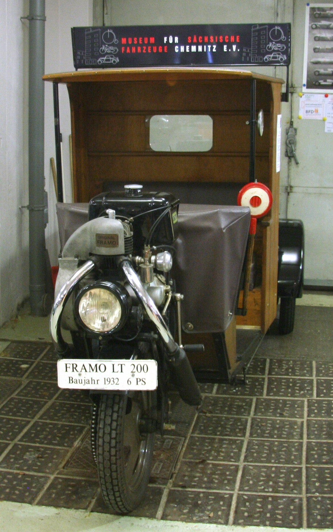 Framo LT 200, Vorderansicht, im Museum für sächsische Fahrzeuge in Chemnitz